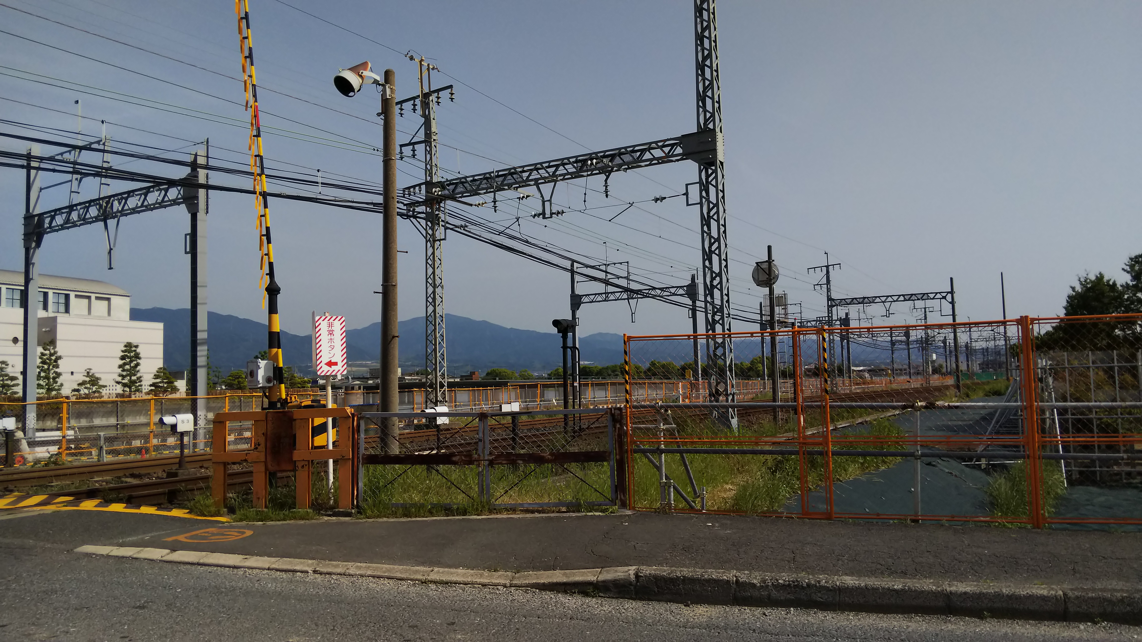 旭ヶ岡駅の跡地